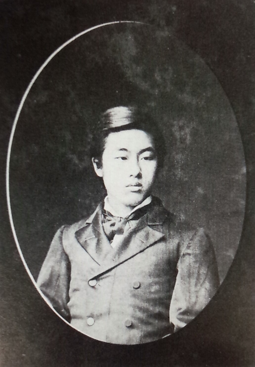 一条忠貞の肖像写真。